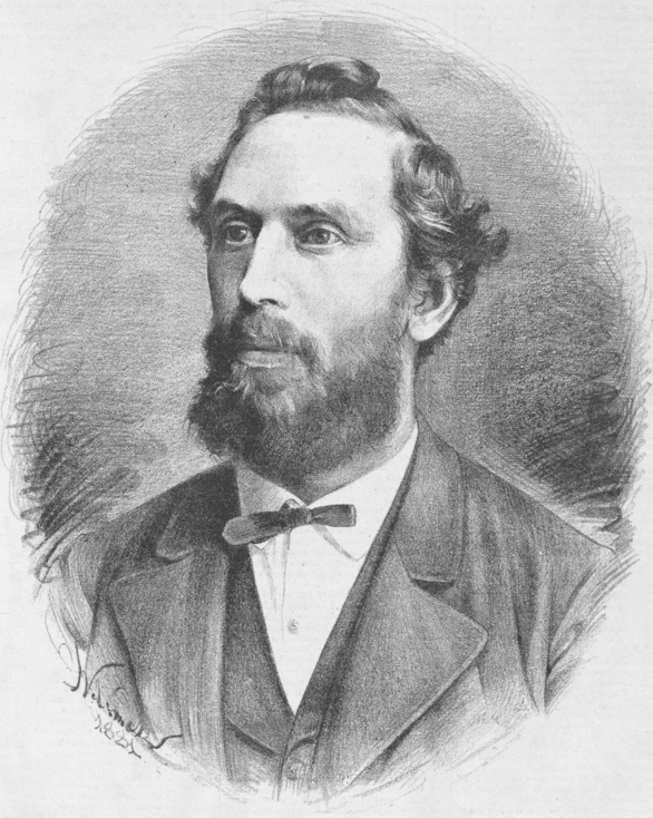 Josef Mocker (1835 - 1899), architekt. Portréty osobností od Jana Vilímka